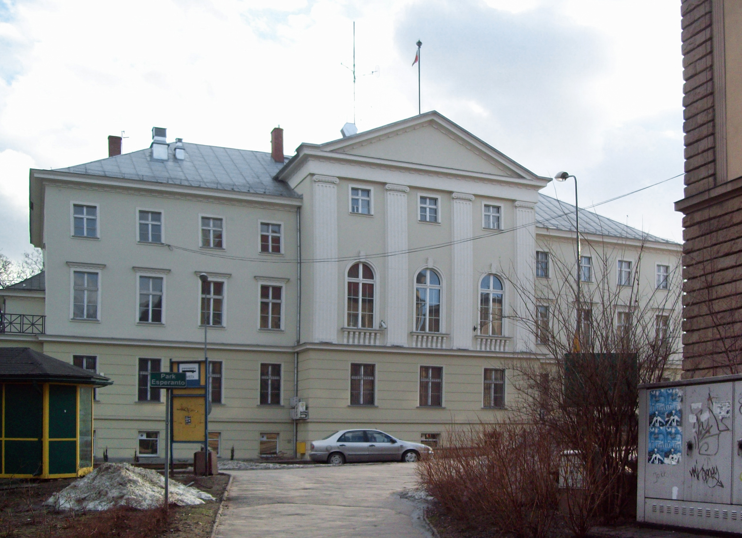 Starostwo Powiatowe w Kłodzku, widok od strony Parku Esperanto.